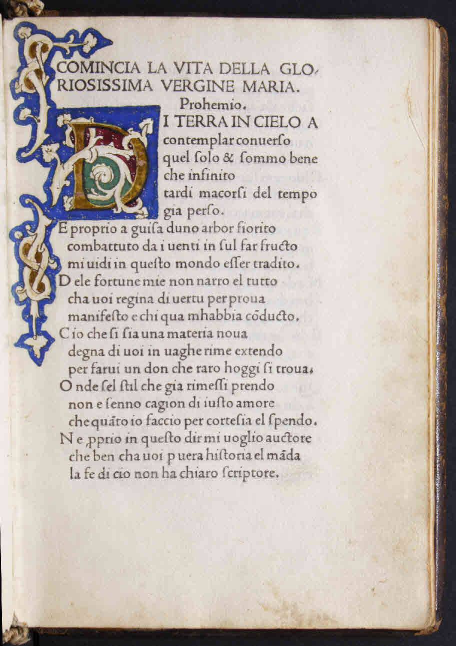 Vita della Vergine Maria. - [Venezia] : Nicolaus… Ienson, MCCCCLXXI. - 42 c. ; [a¹⁰, b-e⁸] ; 4º. - Mancano le cc. a1 e e8 (bianche) .